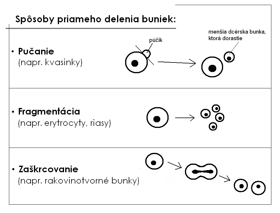 Amitóza - príklady priameho delenia buniek